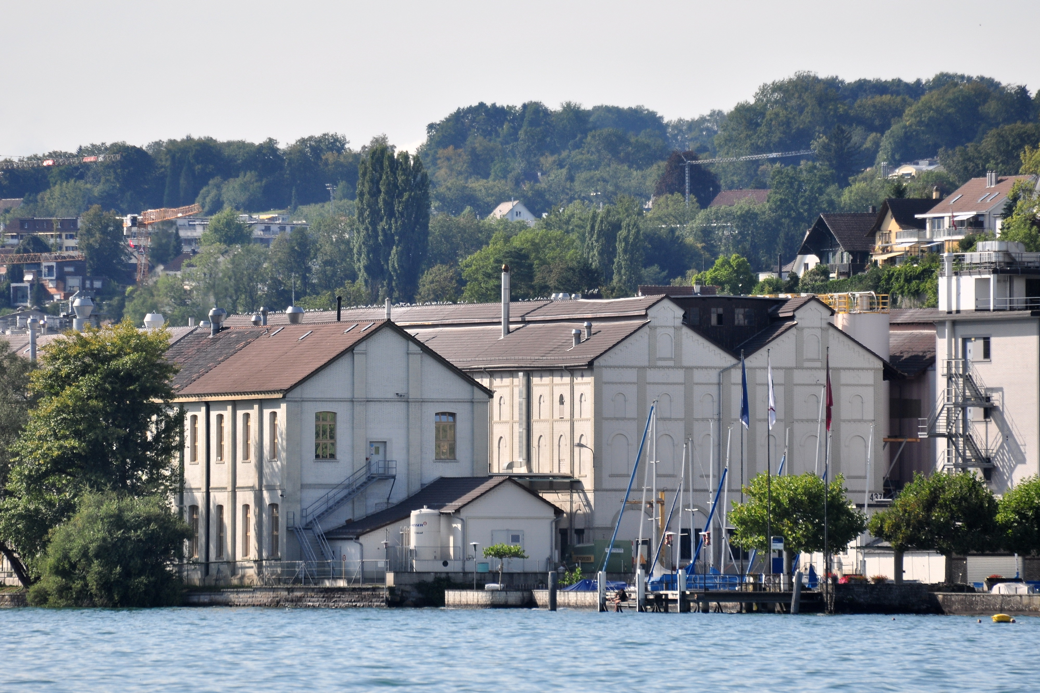 Chemische Fabrik in Uetikon am See (Switzerland) as seen from Zürichsee-Schifffahrtsgesellschaft (ZSG) paddle steamship Stadt Rapperswil